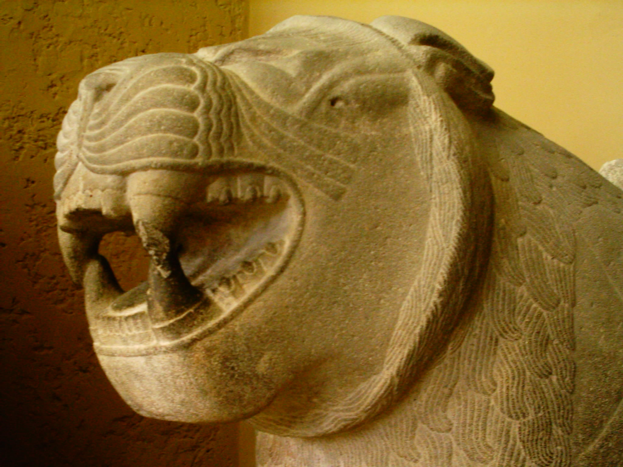 Löwenskulpturen vom Inneren Burgtor in Sam’al/Zincirli. 8 Jh. V. Chr. Basalt. Pergamon Museum, Berlin.